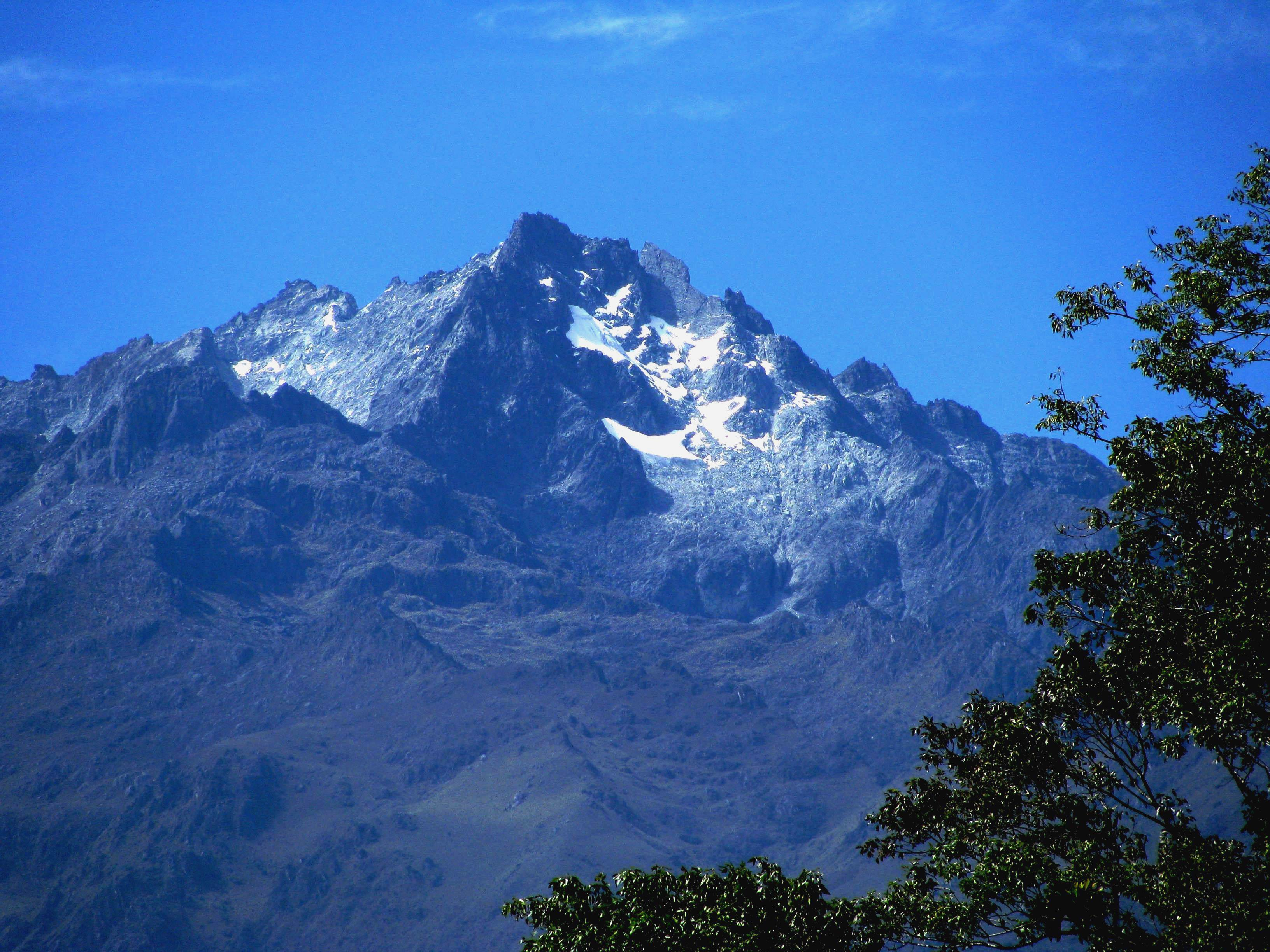 Nuestro imponente Pico Bolívar nos regala sus nieves perpetuas en lo más alto de la cordillera merideña.